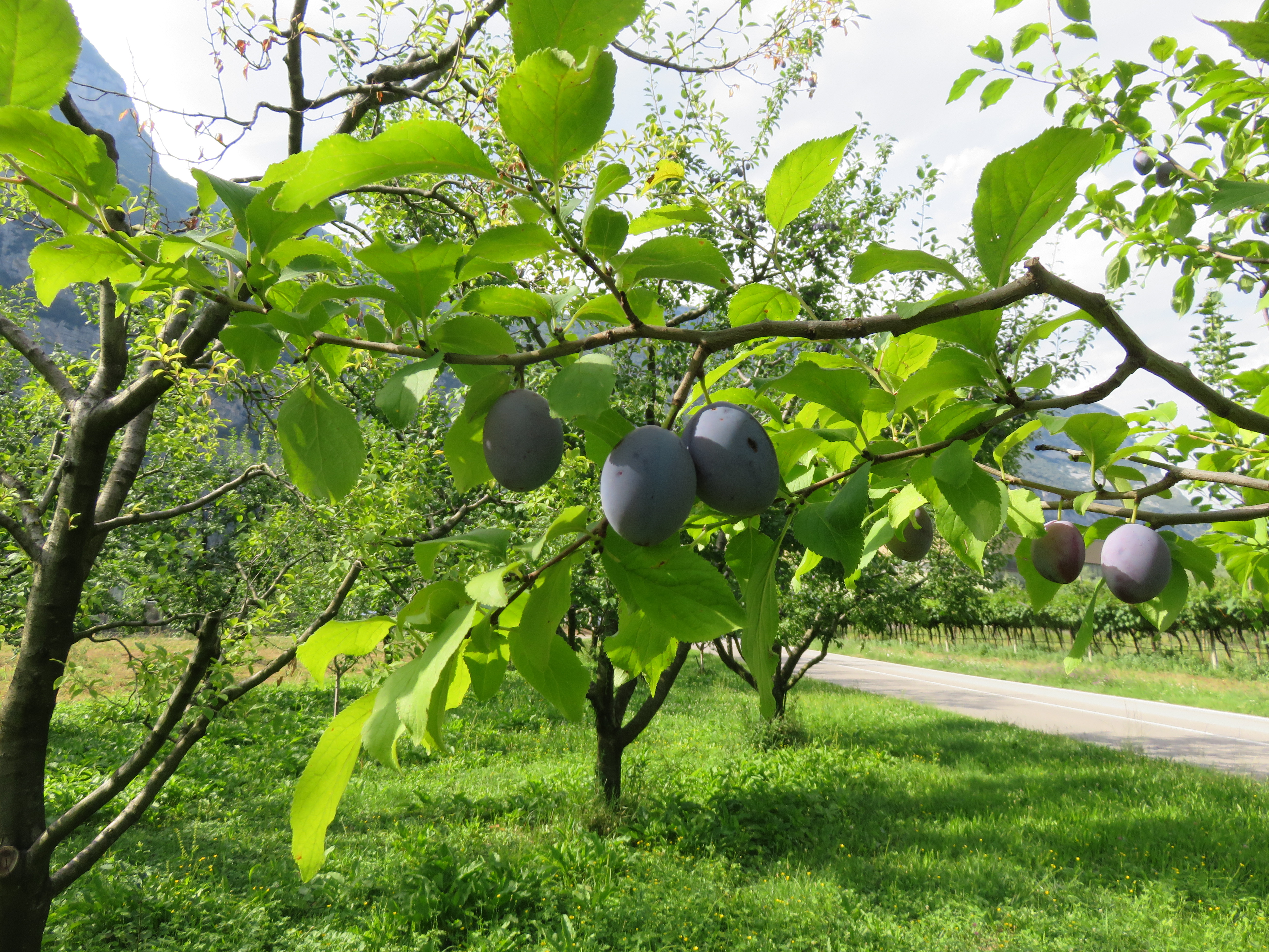 coltura di susine (prugne) a Dro - Prodotto tipico locale